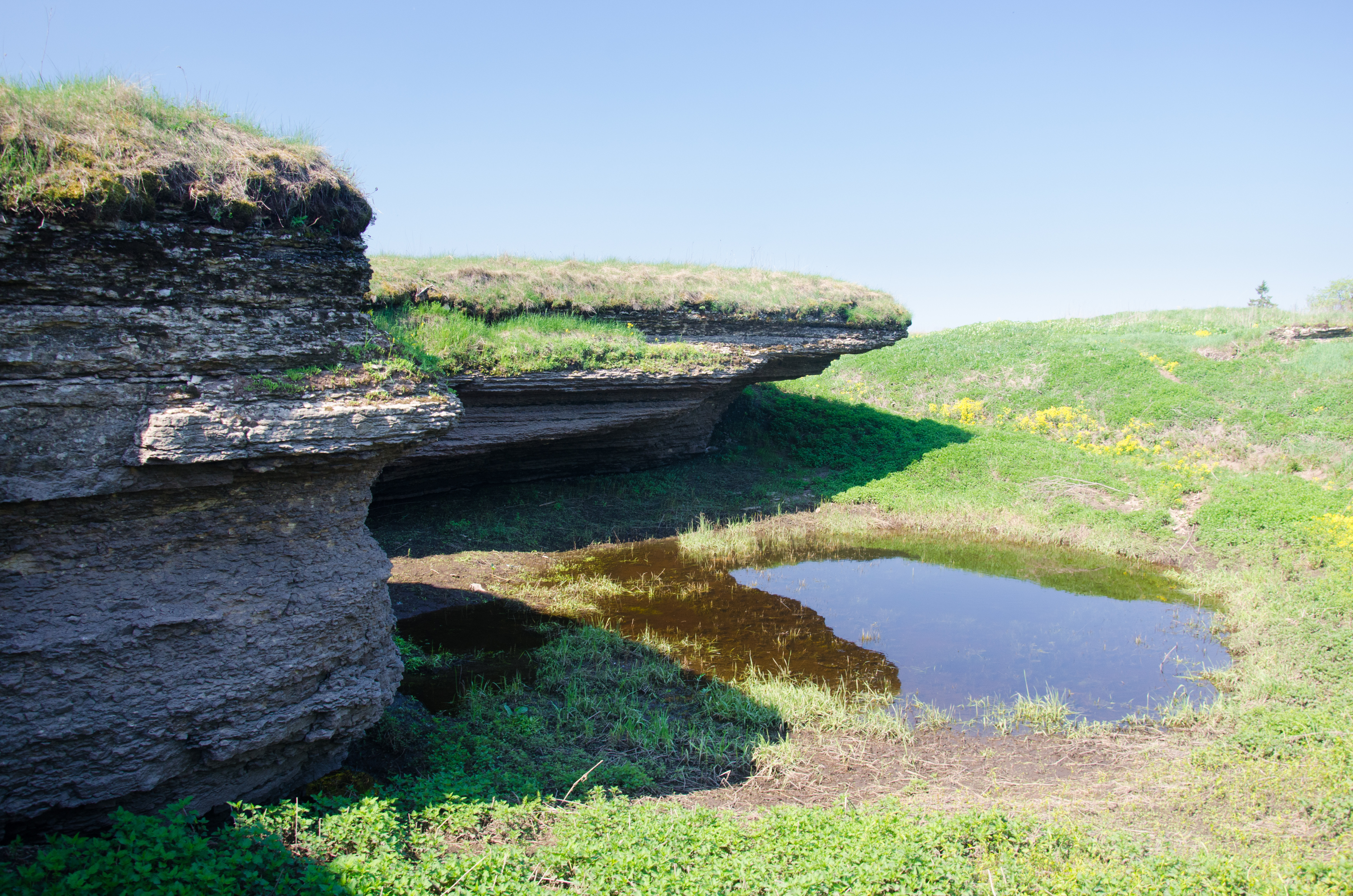 Kostivere karstiala